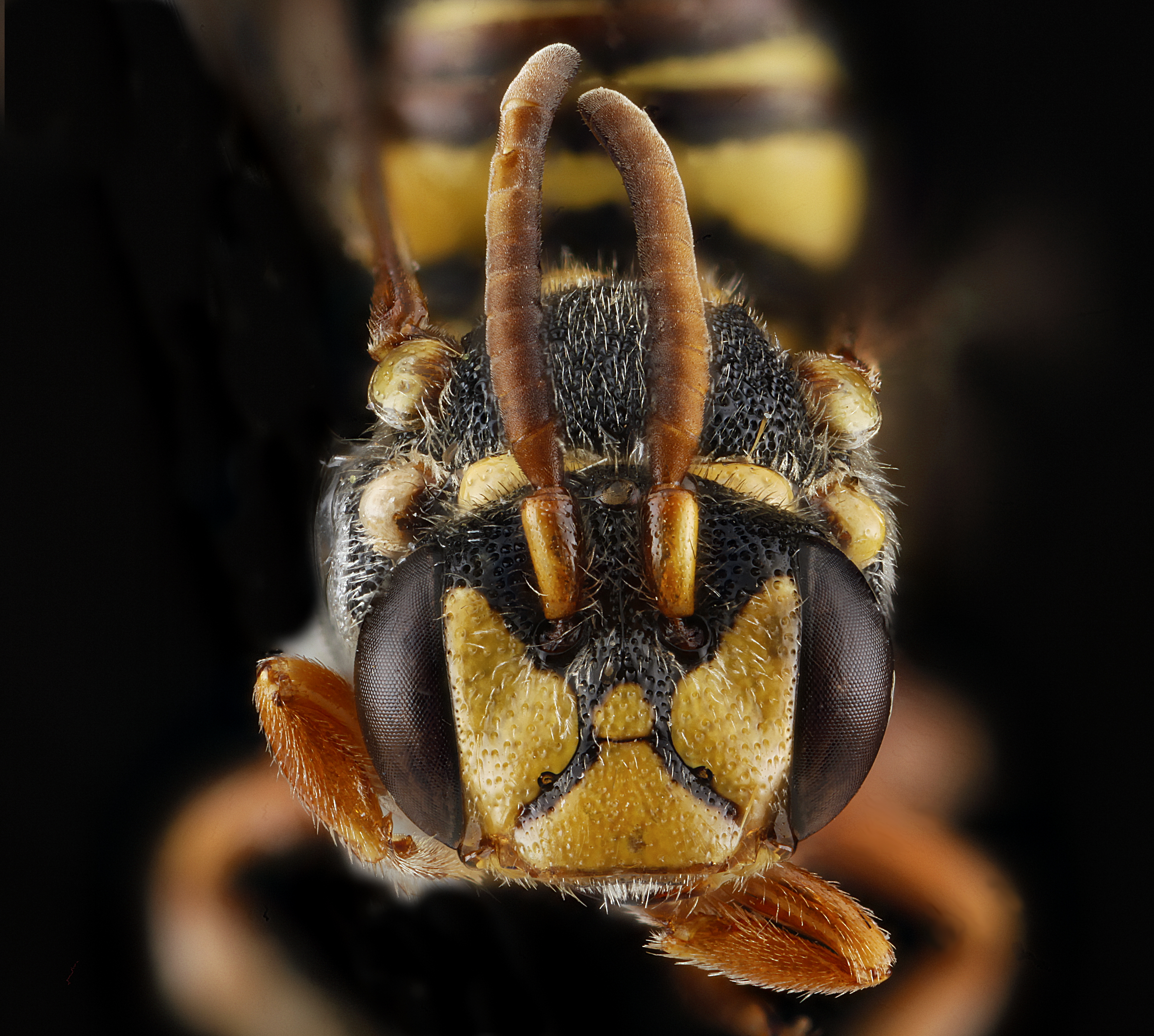 Nomada texana, male, face_2012-08-09-17.08.11 ZS PMax